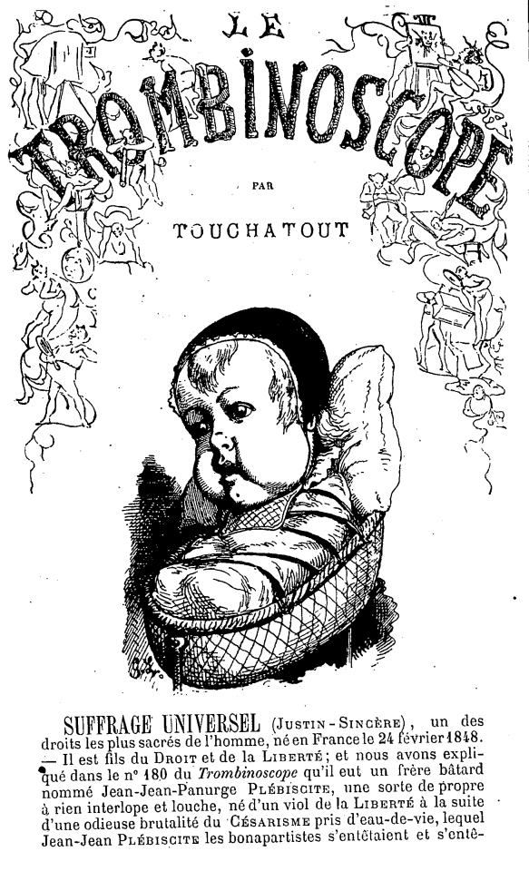 Le Suffrage universel (Universal suffrage) as portrayed by Léon Bienvenu (1835-1911)